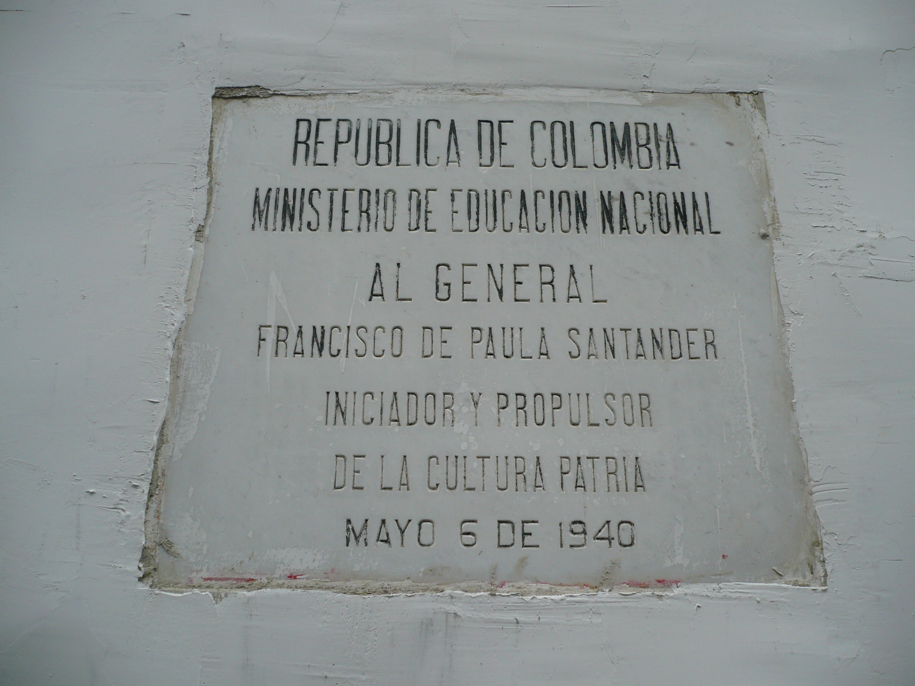 Placa ubicada en el antiguo Convento de San Francisco, posterior primera edificación que utilizó el Colegio Académico y donde actualmente funciona la Corporación de Estudios Tecnológicos del Norte del Valle. Cartago, Valle del Cauca, Colombia.